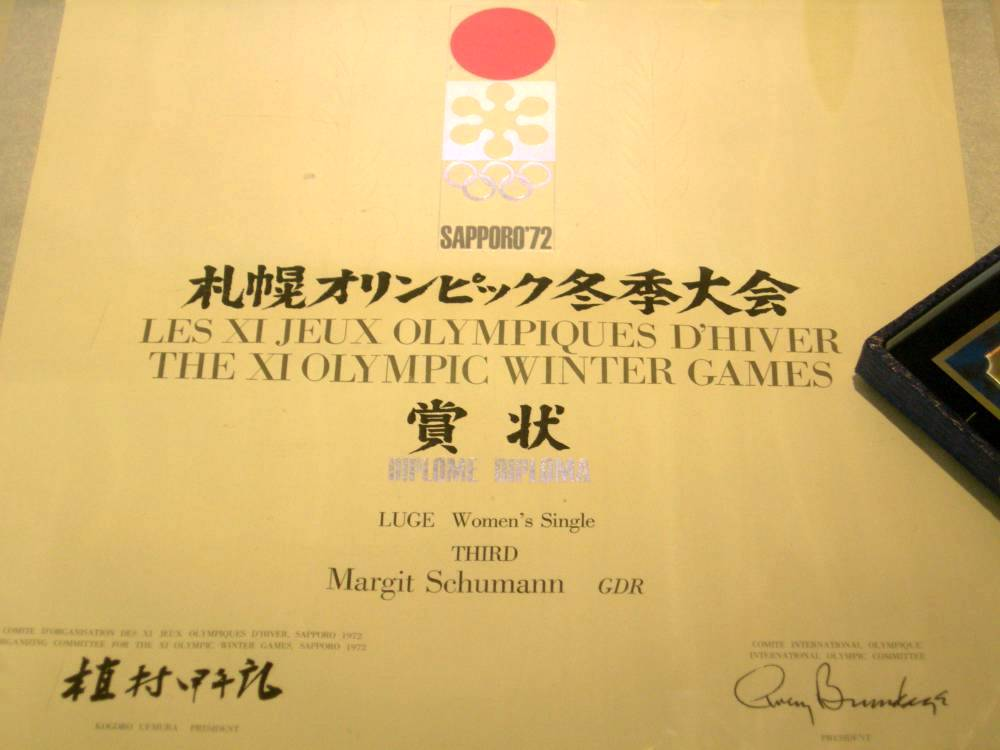 Olympische Winterspiele 1972 - Urkunde von Margit Schumann. Eigenes Foto, gemacht im Thüringer Wintersportmuseum in Oberhof.